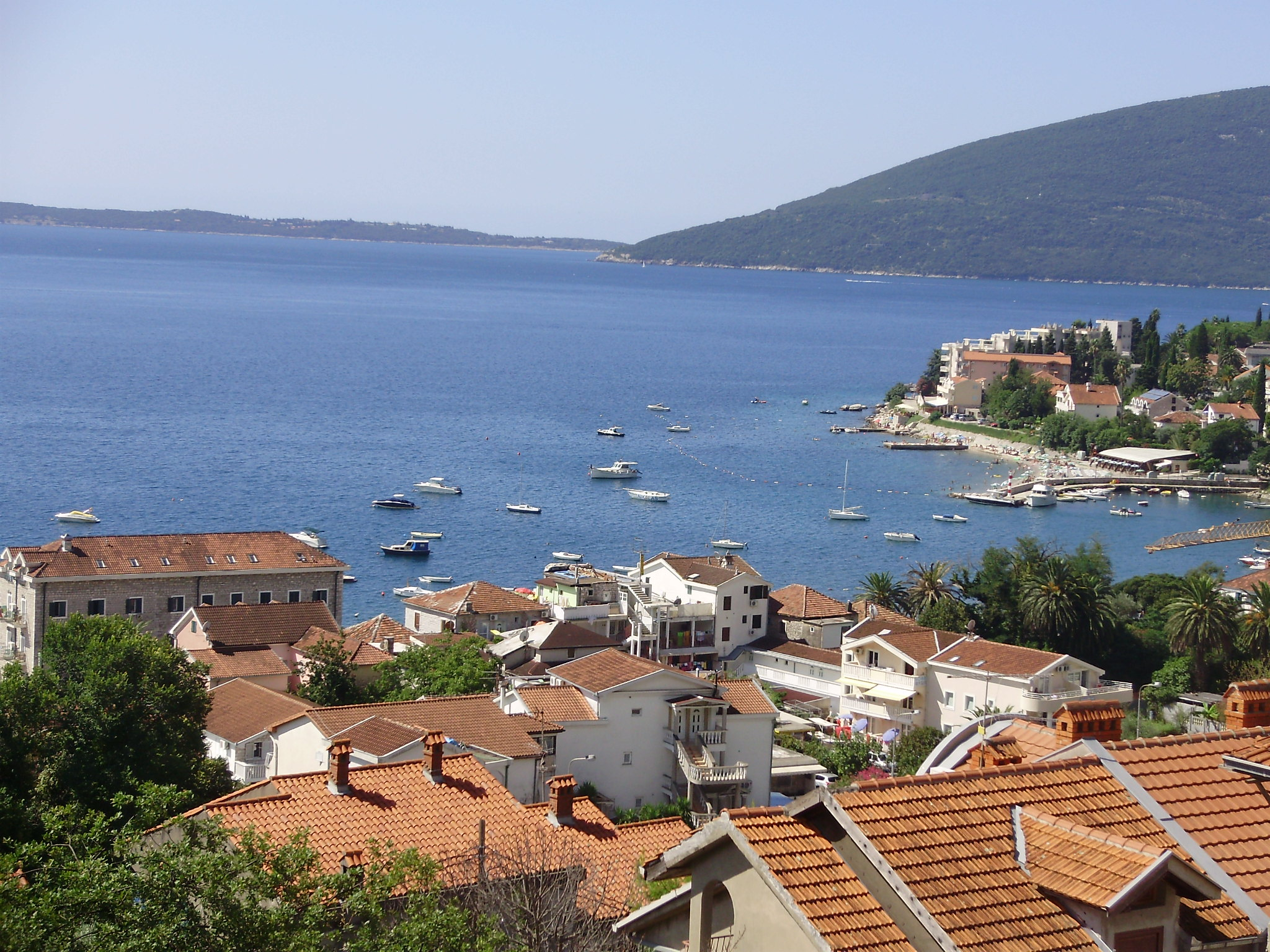 Meljine, Montenegro